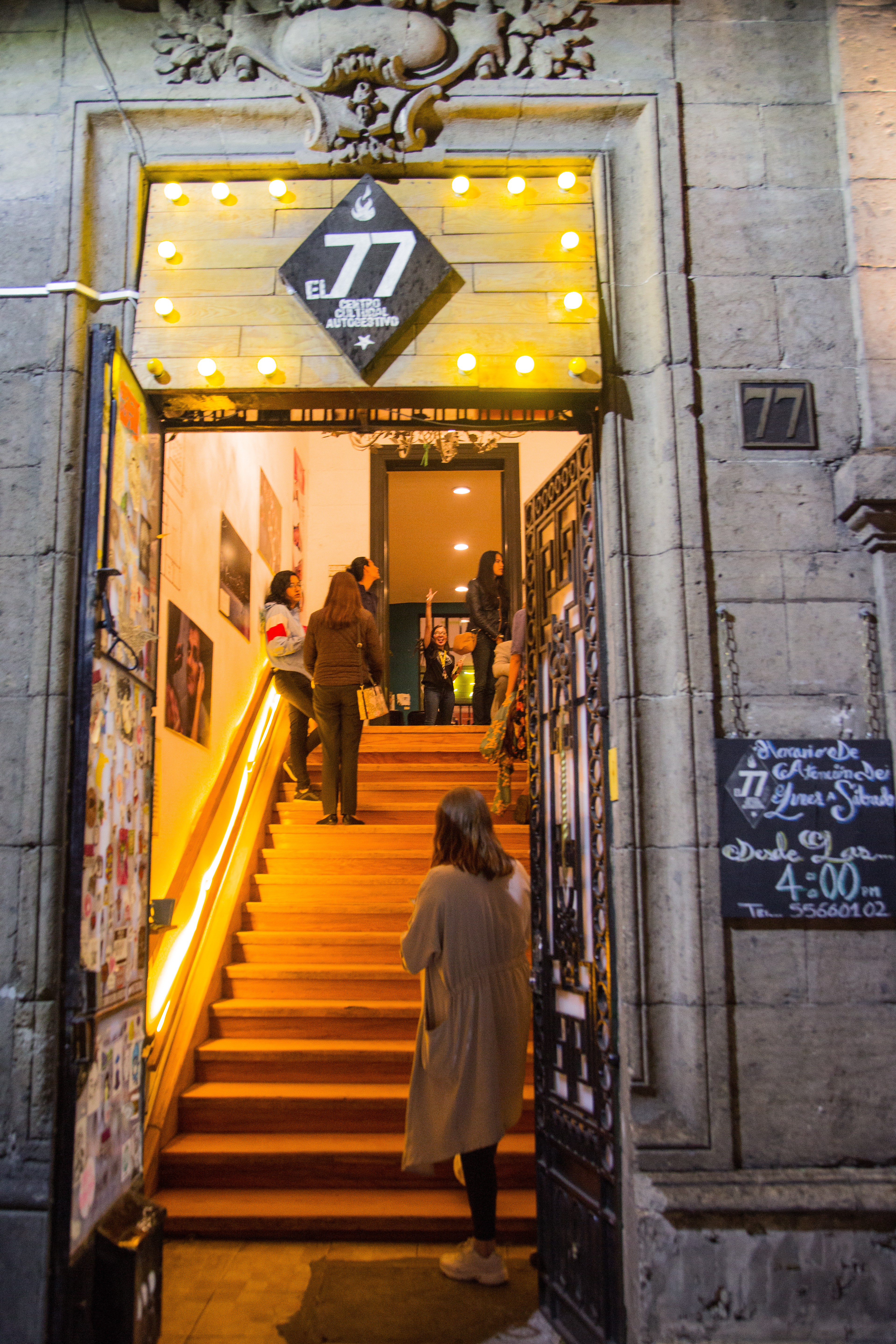 Entrada principal al recinto, público asistente a eventos.